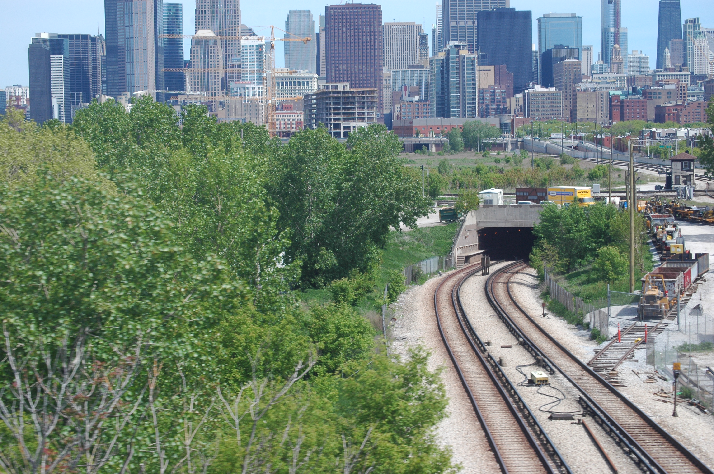 Red Line